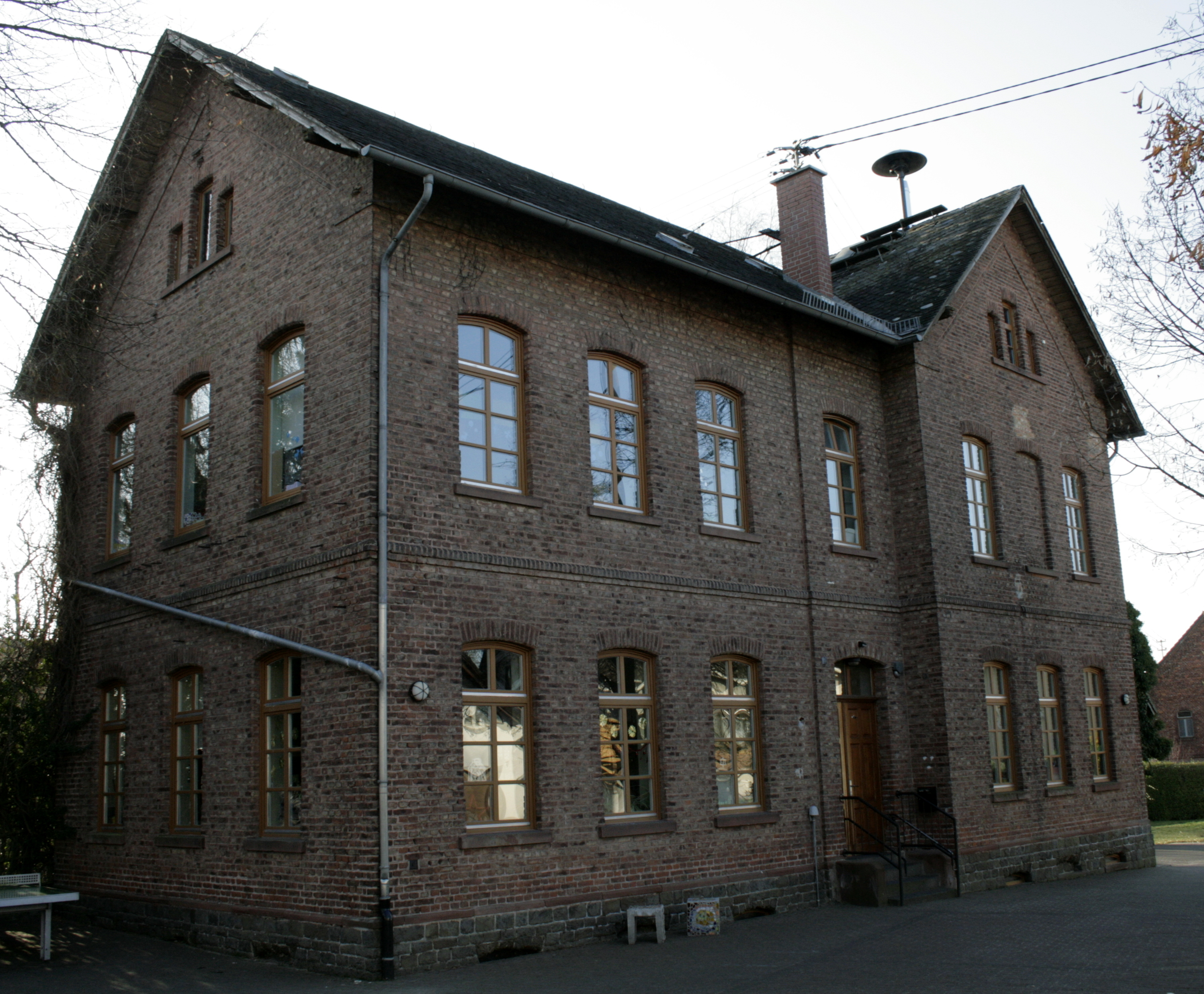 Grundschule in Hadamar-Oberzeuzheim, Deutschland